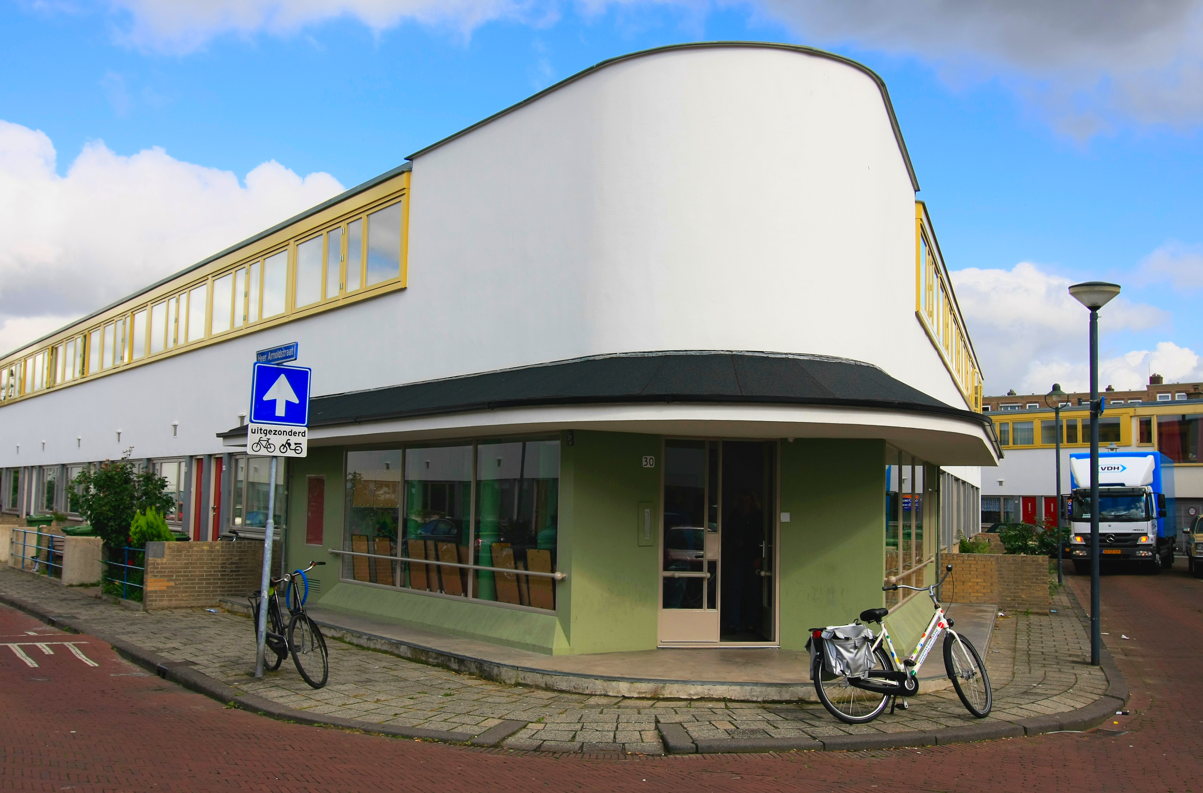 Winkelpand aan de Heer Arnoldstraat 30 te Rotterdam